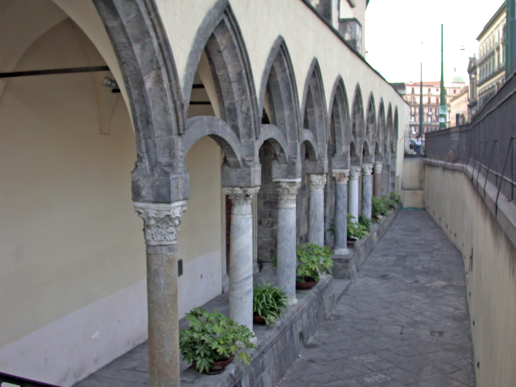 Italia, regione Campania, chiesa di Santa Maria Incoronata, porticato sul fianco sinistro